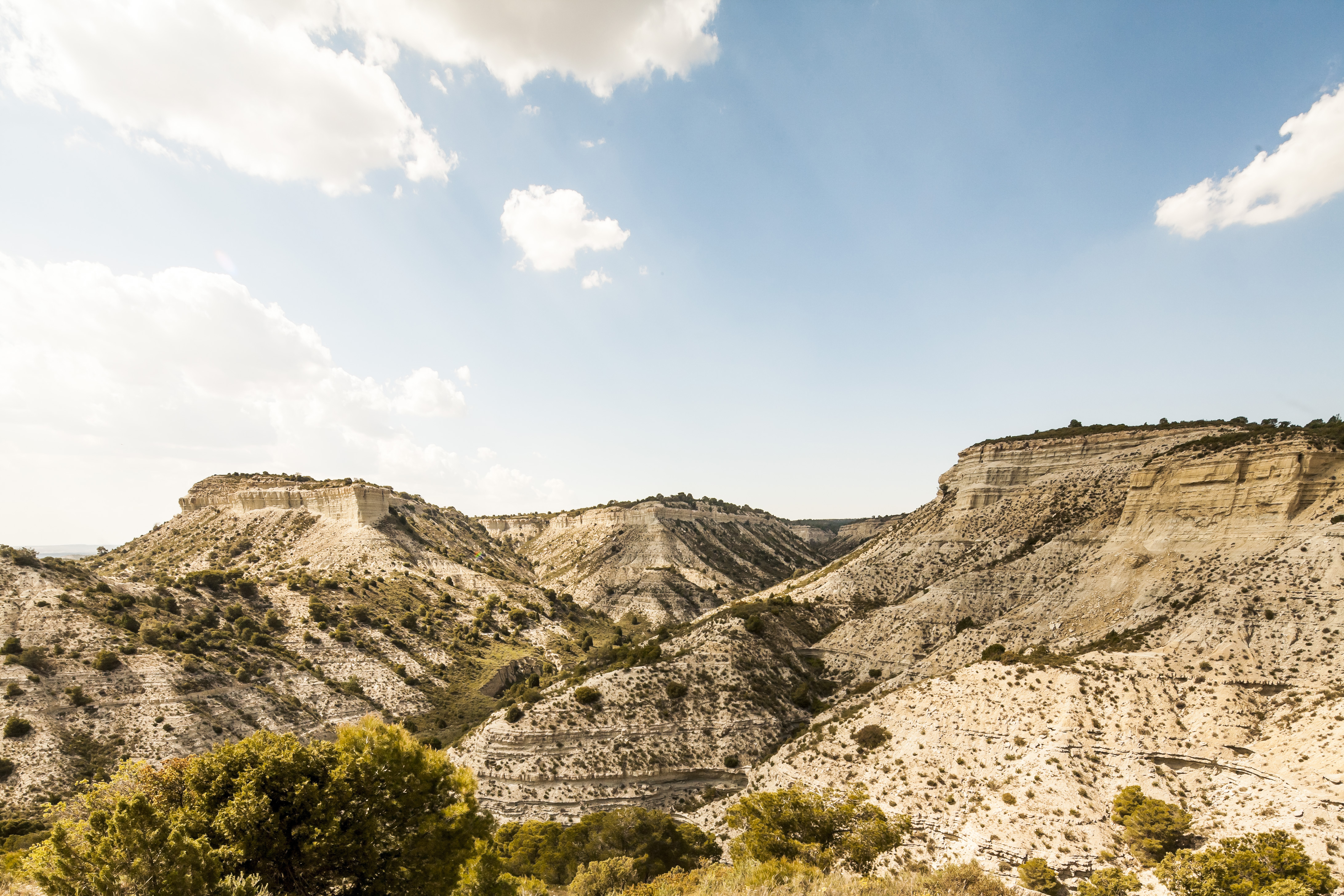 Barranco de Bujal, en Monegrillos (sierra de Alcubierre) This is a photography of a Special Area of Conservation in Spain with the ID: ES2410076. Natura2000 entry, EEA entry